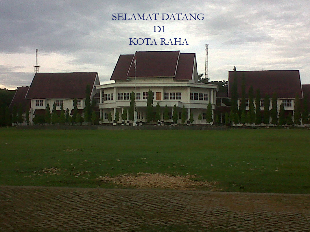 Le bureau du bupati de Muna, Sulawesi du Sud-Est, Indonésie